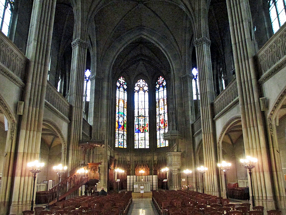 Offene Kirche St. Elisabeth, Basel. Innenansicht